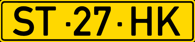 Номерний знак Кабо-Верде